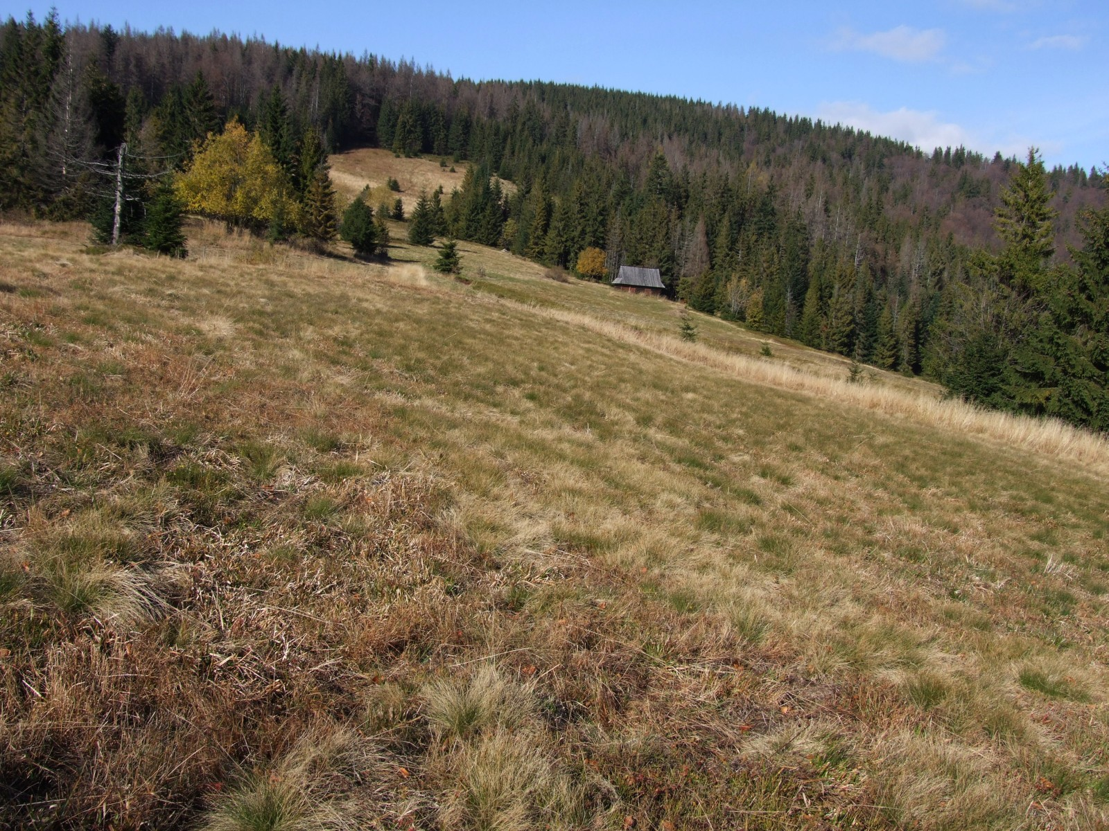 Polana Stawieniec w Gorcach